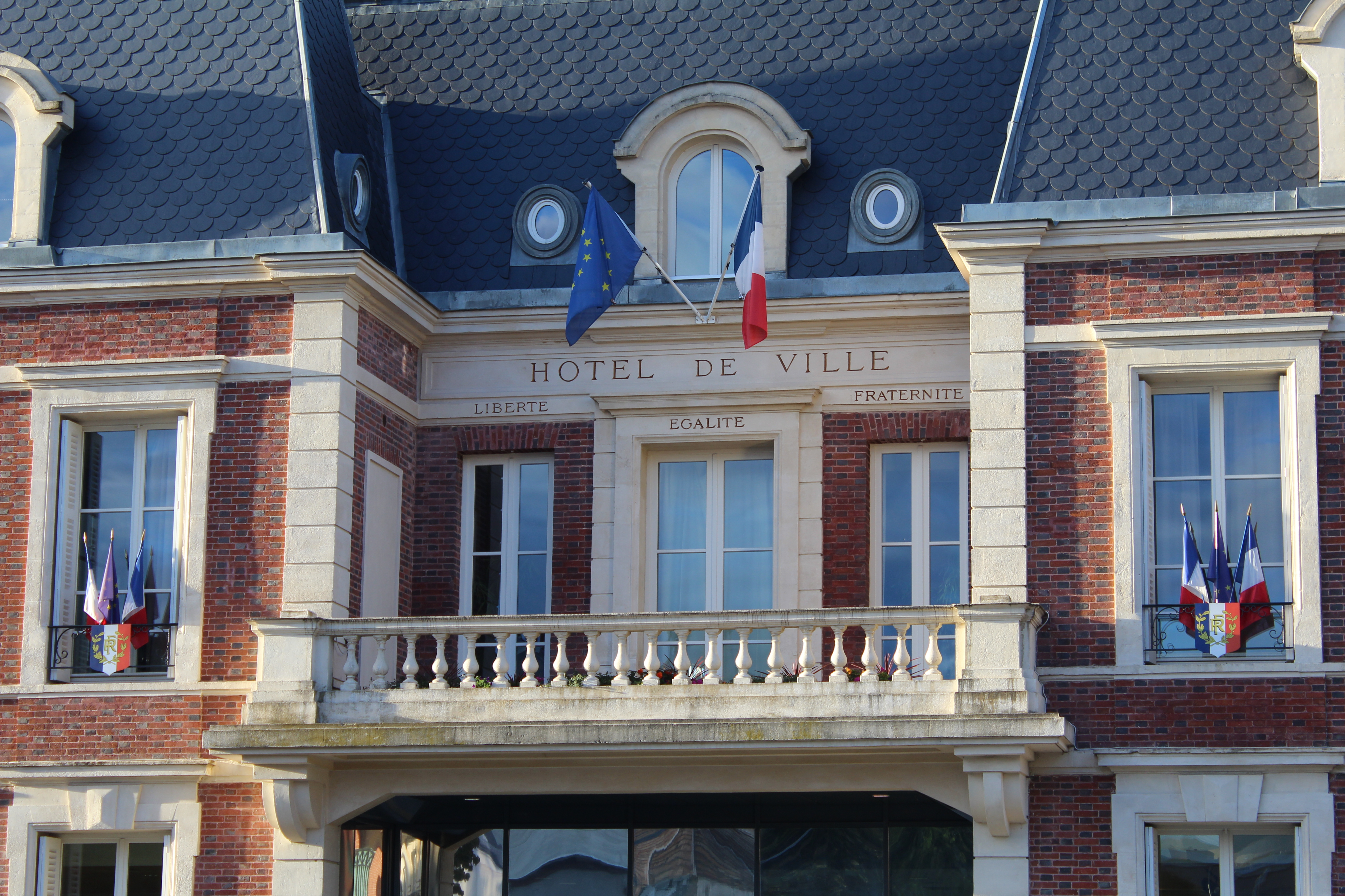 Mairie de Noisy-le-Grand.